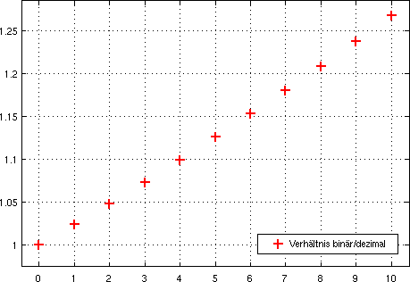 Binprefix